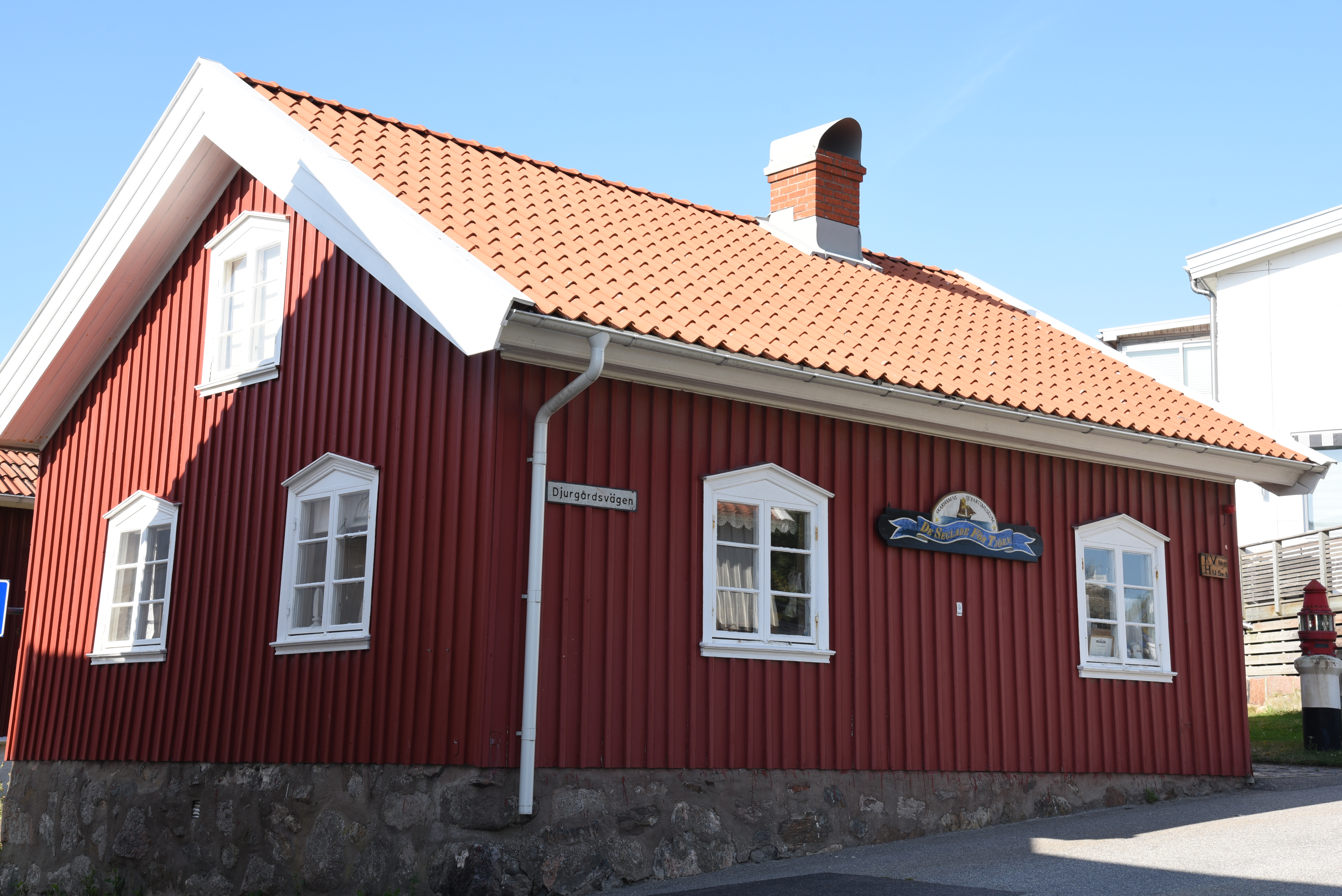 Skärhamns sjöfartsmuseum i Skärhamn på Tjörn.